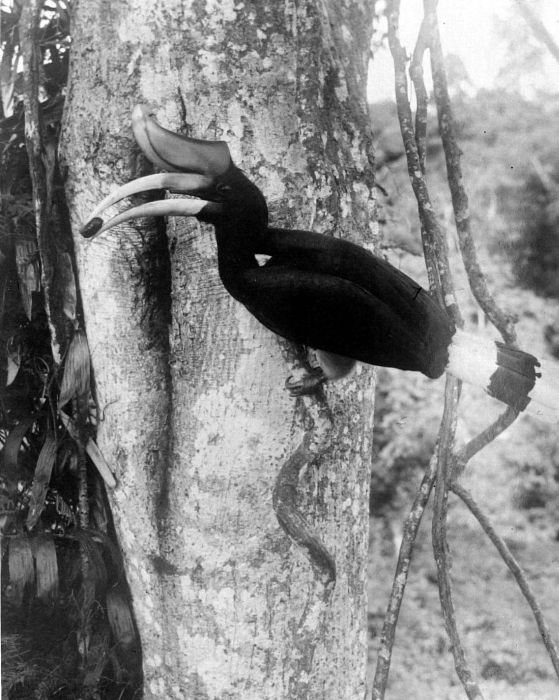 Negatief. Een neushoornvogel (Buceros rhinoceros) voedert een jong, Pematang Siantar, Noord-Sumatra